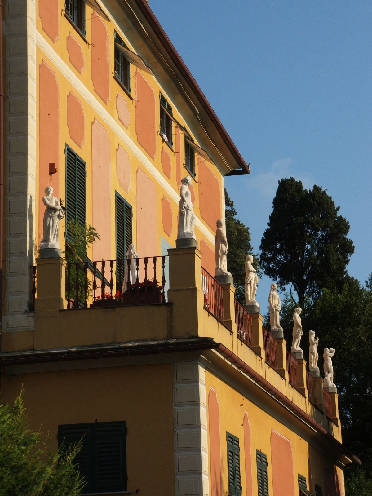 Genova, quartiere di Albaro